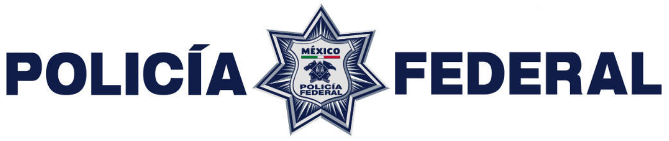 Logo de la Policía Federal de México